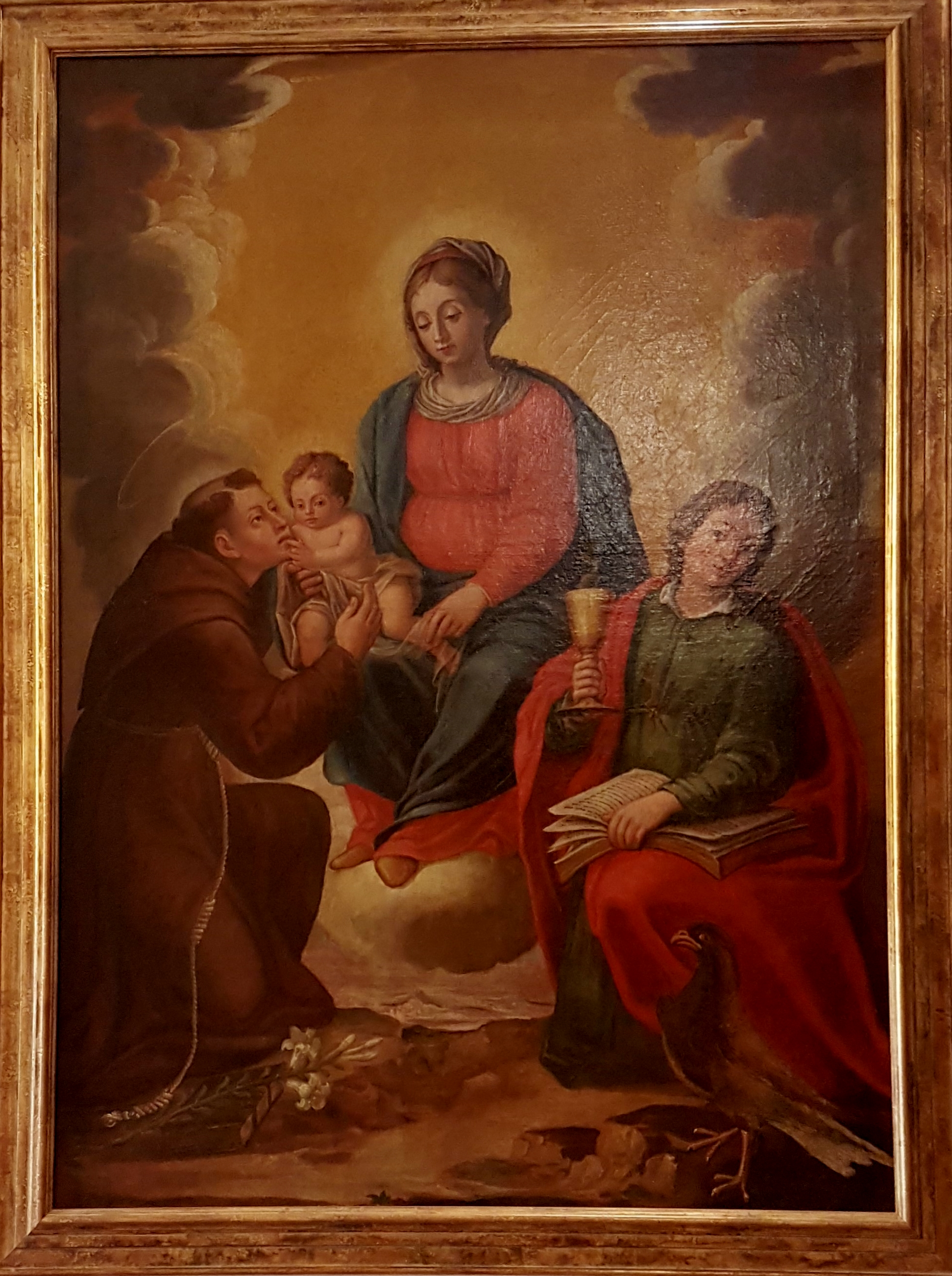 Madonna e Bambino con Santi